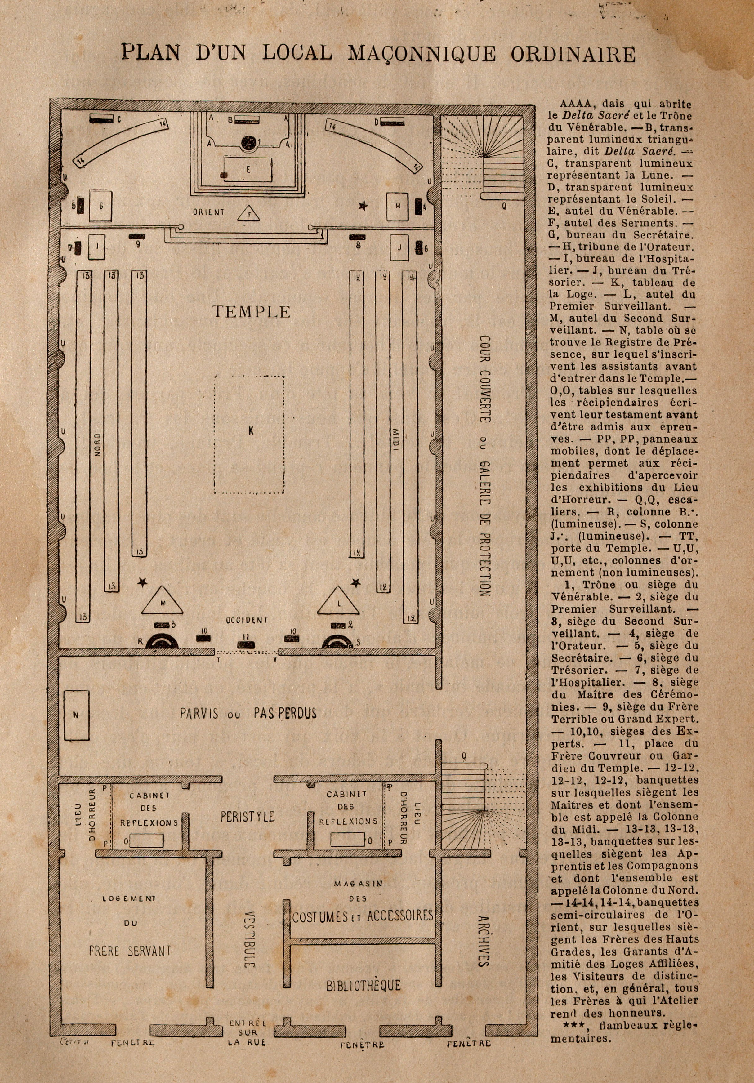 Une des gravures du document de Léo Taxil, Les Mystères de la Franc-Maçonnerie, Paris, 1886.